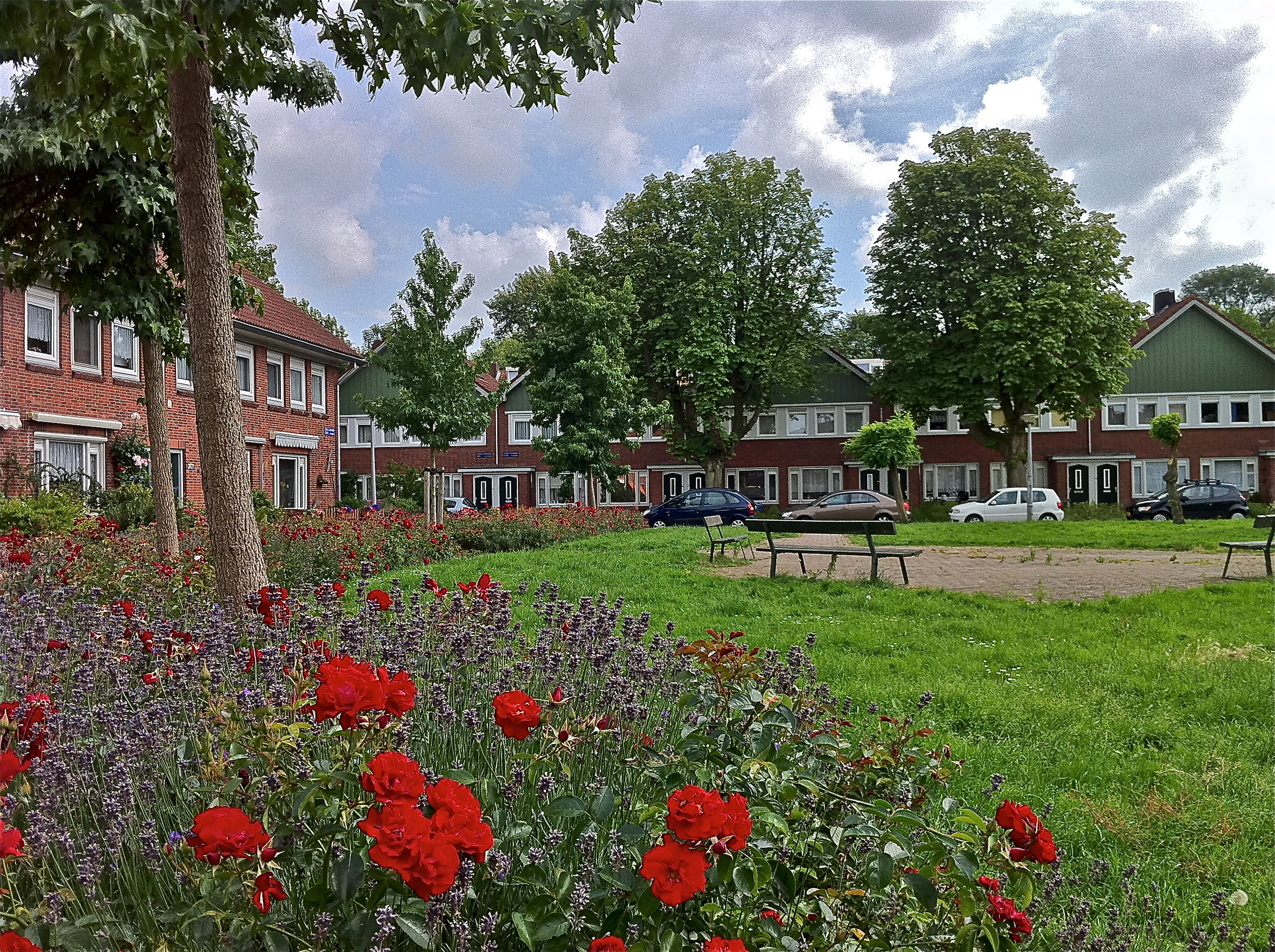 Tuindorp Buiksloot Amsterdam-Noord juli 2011